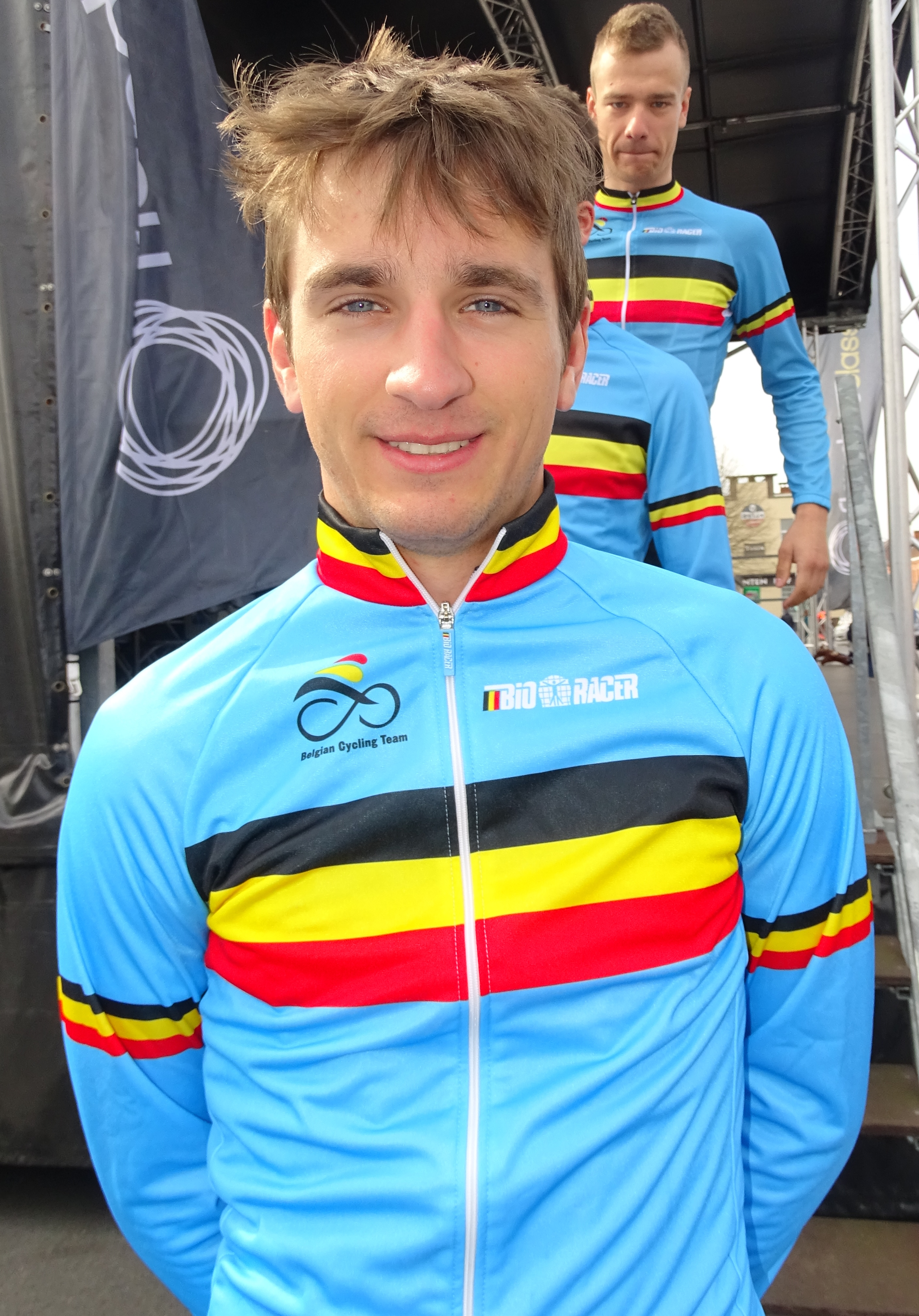 Reportage réalisé le samedi 9 avril à l'occasion du départ et de l'arrivée du Tour des Flandres espoirs 2016 à Audenarde, Belgique.